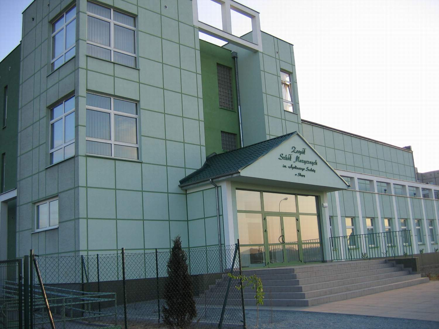 Zespół Szkół Muzycznych im. Apolinarego Szeluty w Słupcy, widok od strony sali koncertowej. (foto. Marcin Majdecki)